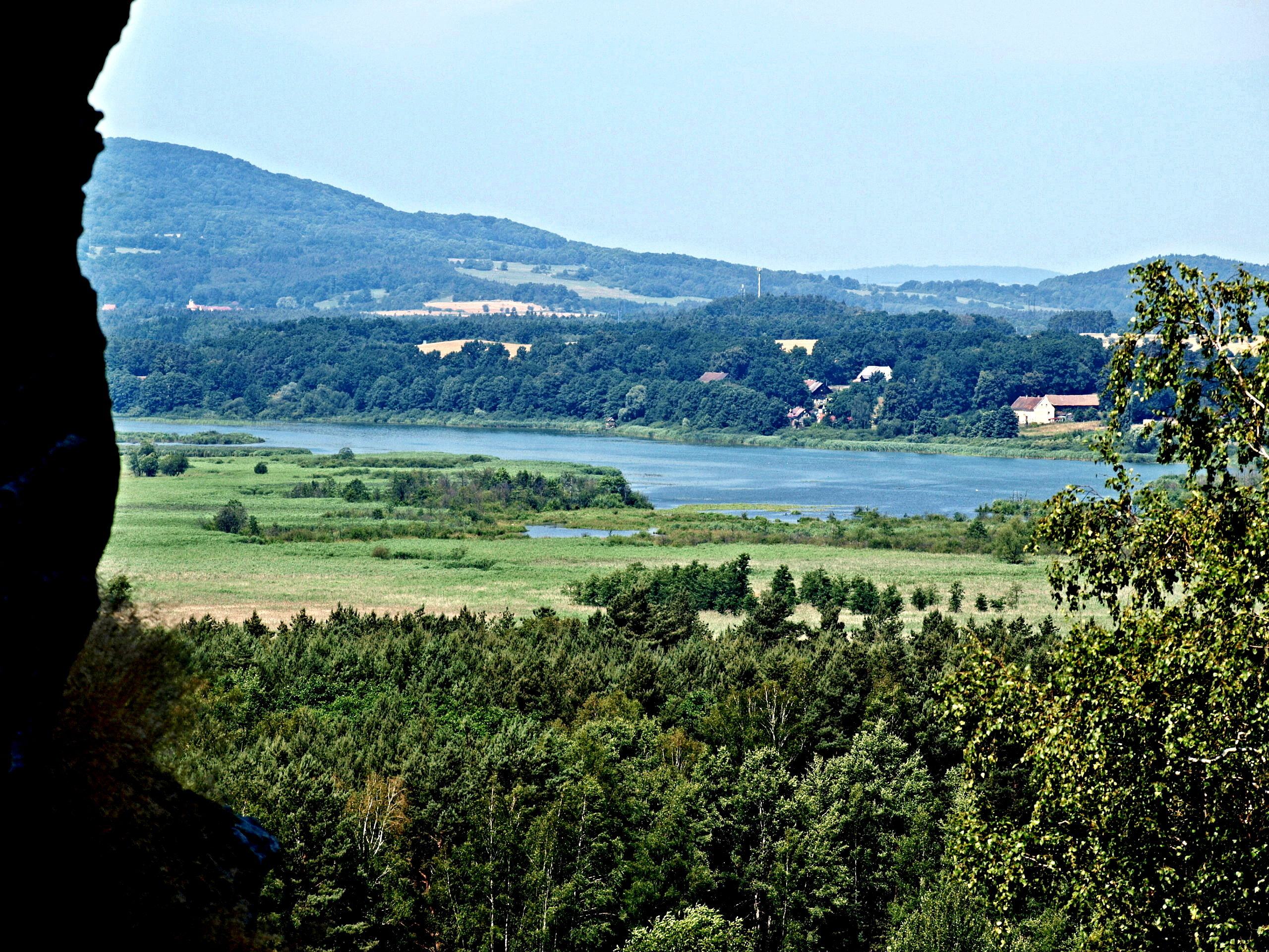 Jestřebí